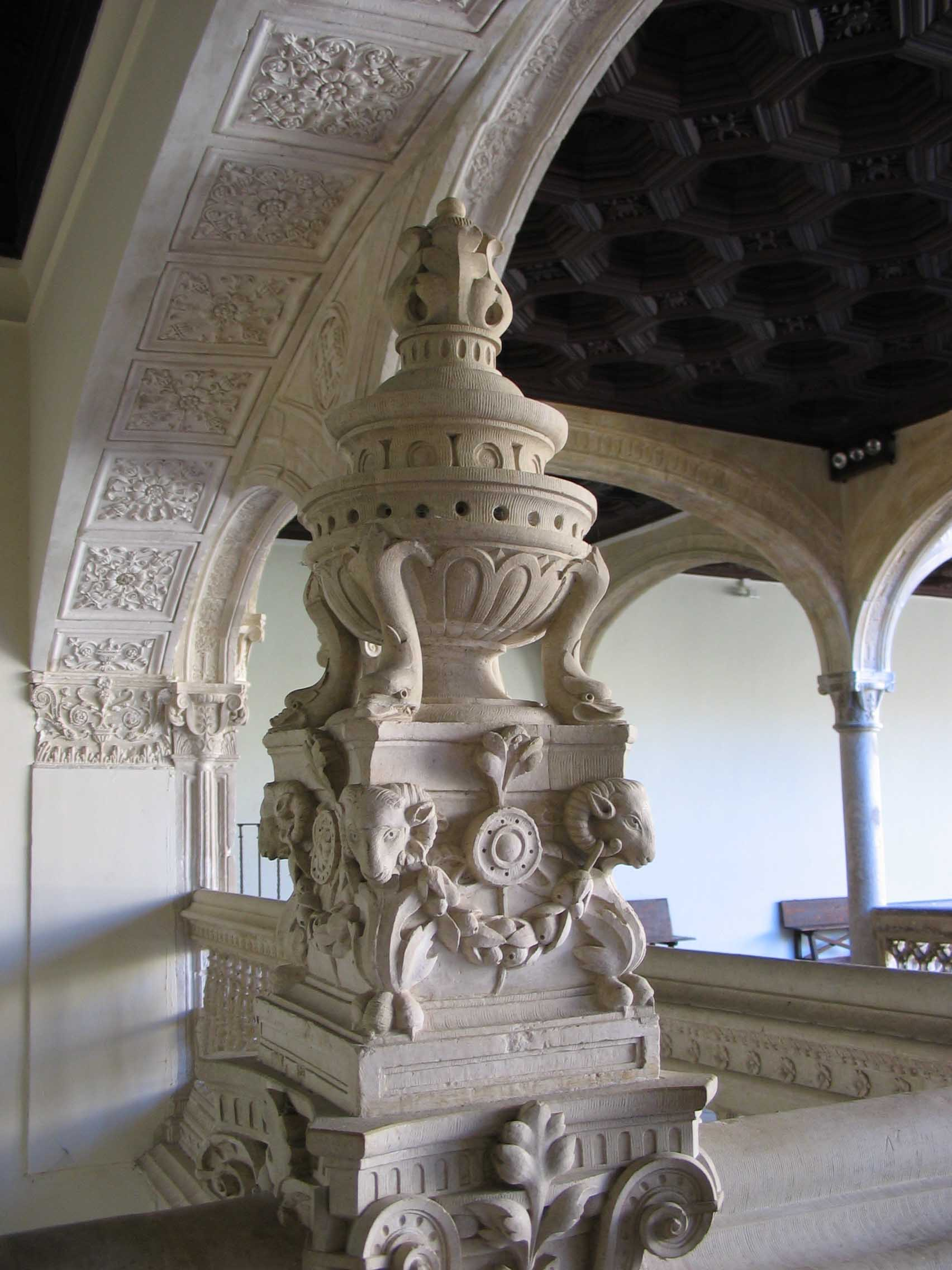 Escalera del Hospital de Santa Cruz, Toledo, España. Renacimiento. Staircase of the former Hospital of Santa Cruz, Toledo, Spain. Renaissance architecture.